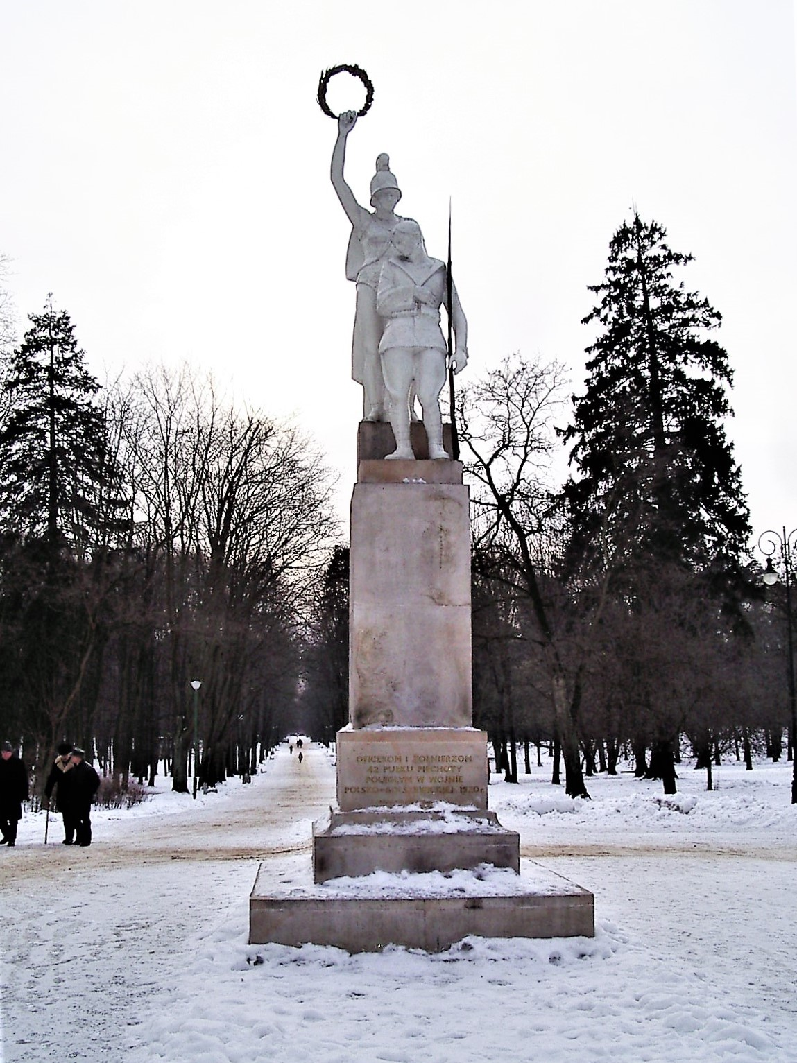 Bellona - Pomnik ku czci poległym w wojnie Polsko - sowieckiej w 1920 r. w Białymstoku. Odsłonięty w 1930 zniszczony wiosną 1940 przez NKWD. Obecnie, zrekonstruowany przez rzeźbiarzy Krzysztofa Gąsowskiego i Krzysztofa Jakubowskiego jako Pomnik żołnierzy 42 PP